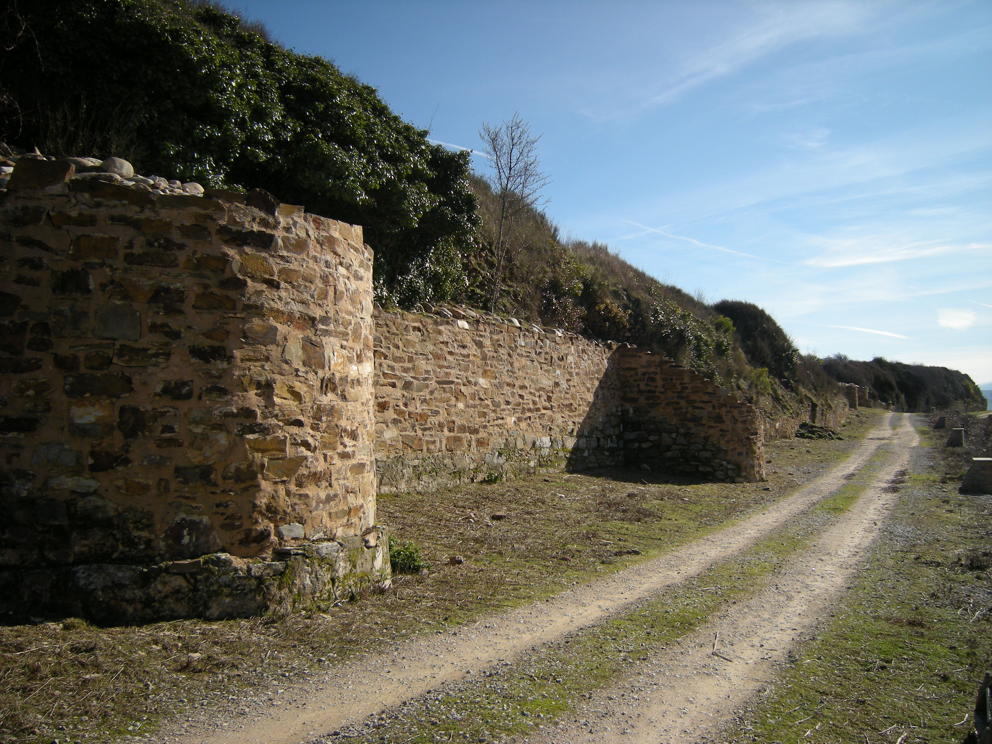 Murallas del lado noroeste.